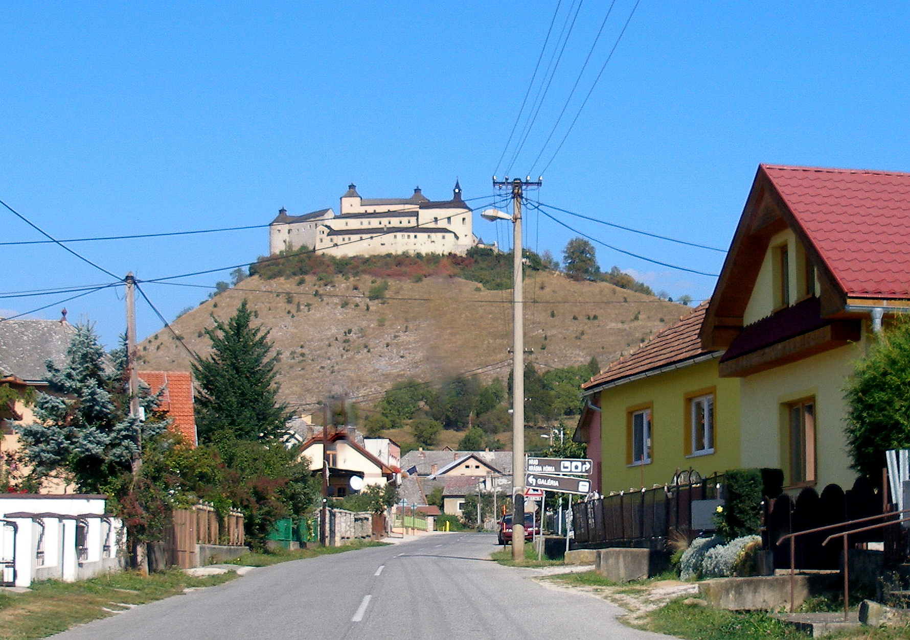 Krásnohorské Podhradie okres Rožňava.